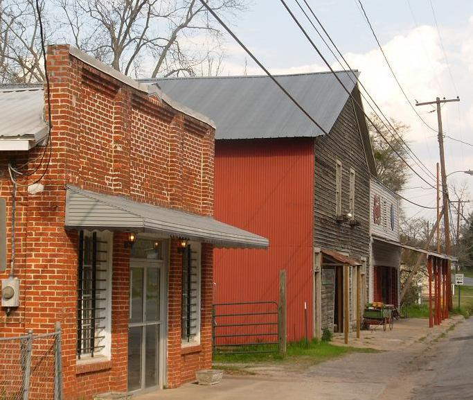 Loachapoka, Alabama